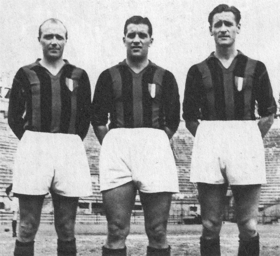 I calciatori svedesi Gunnar Gren (a sinistra), Gunnar Nordahl (al centro) e Nils Liedholm (a destra), ovvero il trio "Gre-No-Li" del Milan, in posa con lo scudetto sulle maglie dopo la vittoria rossonera nel campionato italiano di Serie A 1950-51.